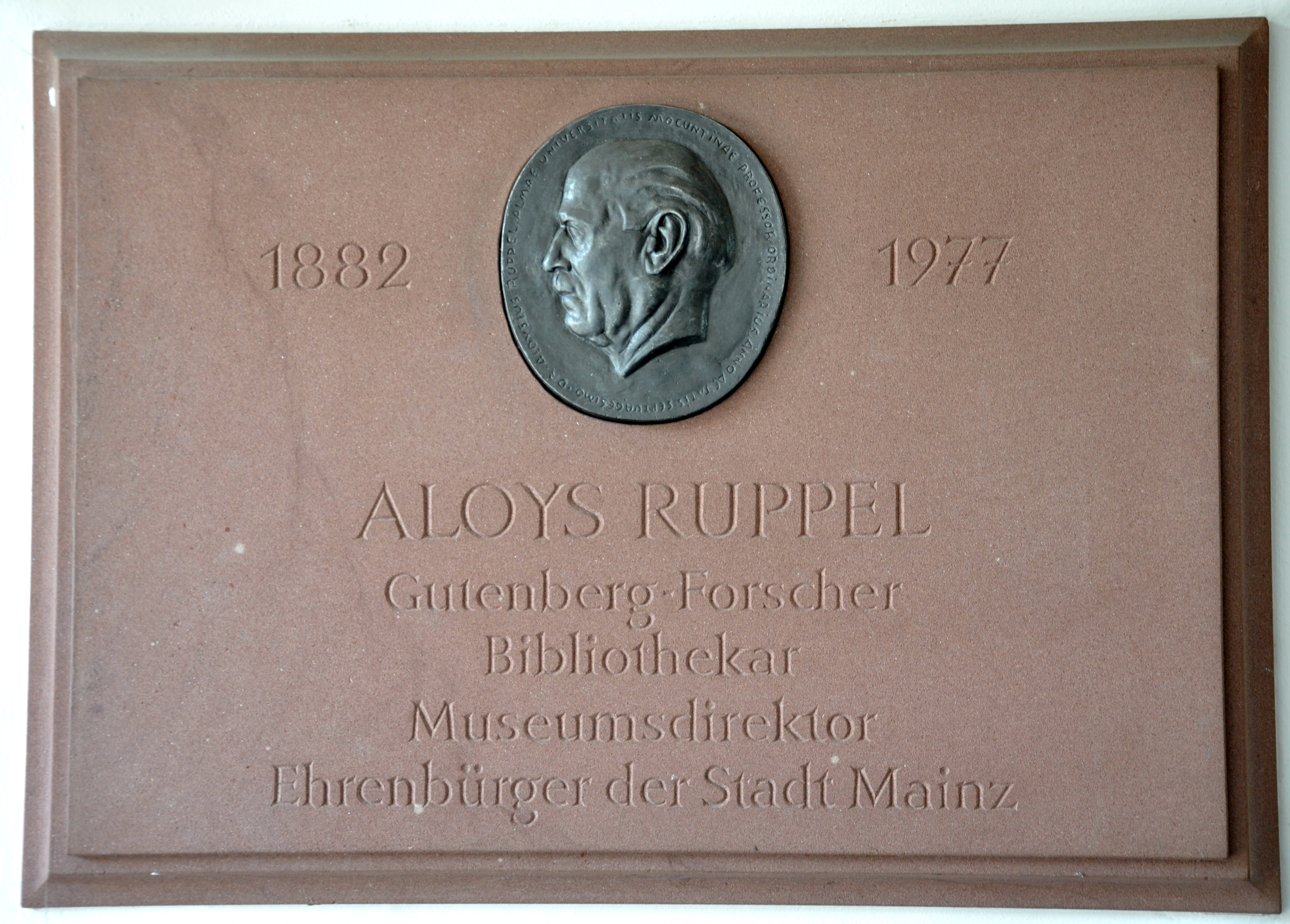 Mainz, Haus Zum Römischen Kaiser, Gedenktafel Aloys Ruppel